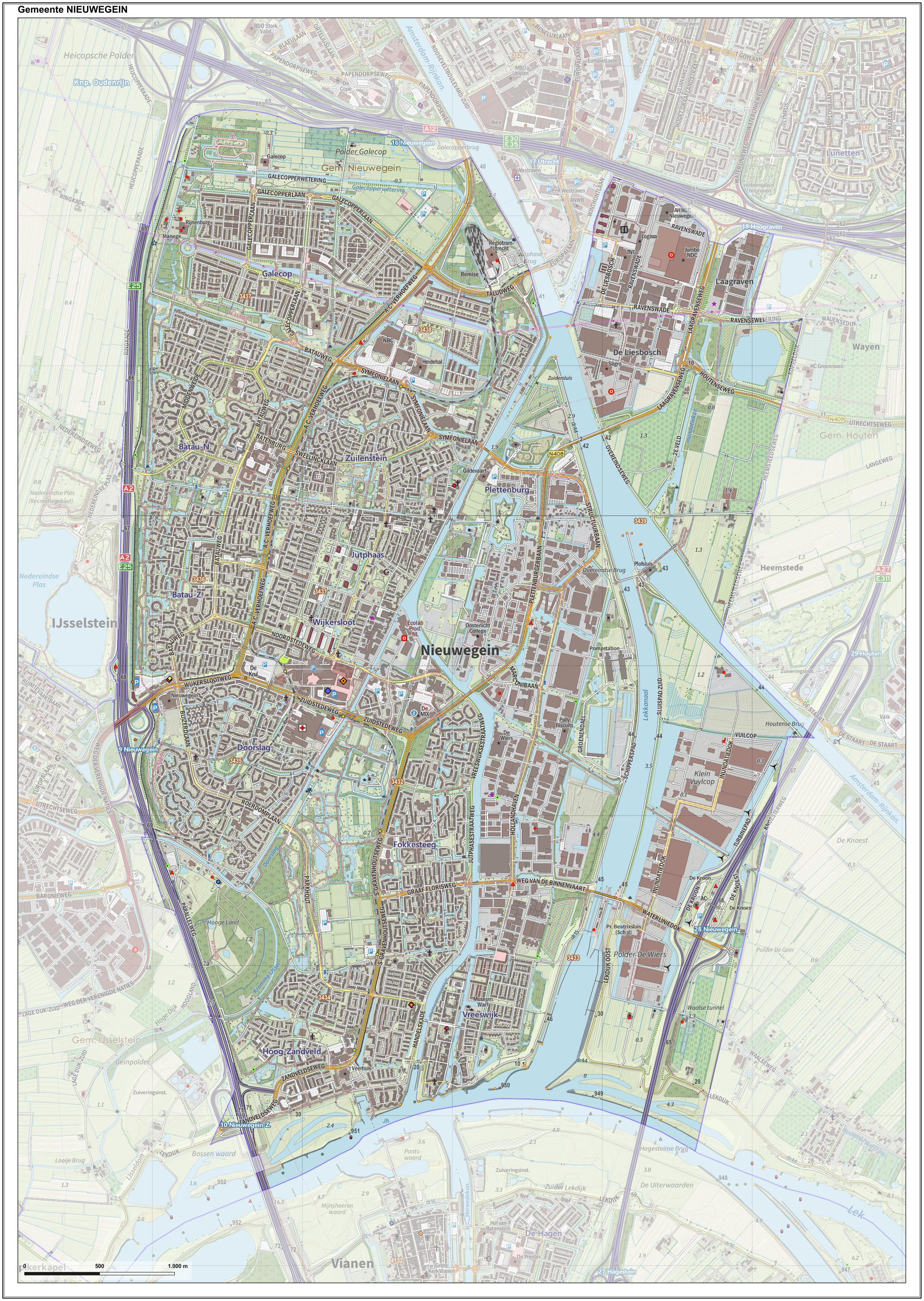 Topografische gemeentekaart. Resolutie: 400 pixels/km. Kaartbeeld samengesteld uit de open geodata van de Top10NL en Top25namen (Kadaster), Creative Commons-BY licentie. Gebouwvlakken uit open geodata BAG extract. Wegen uit de OpenStreetMap, OpenStreetMap community. Reliëfschaduw uit de Actuele Hoogtekaart AHN2. Samenstelling en kleurenschema: Jan-Willem van Aalst, met QGIS. Zie ook de Legenda.